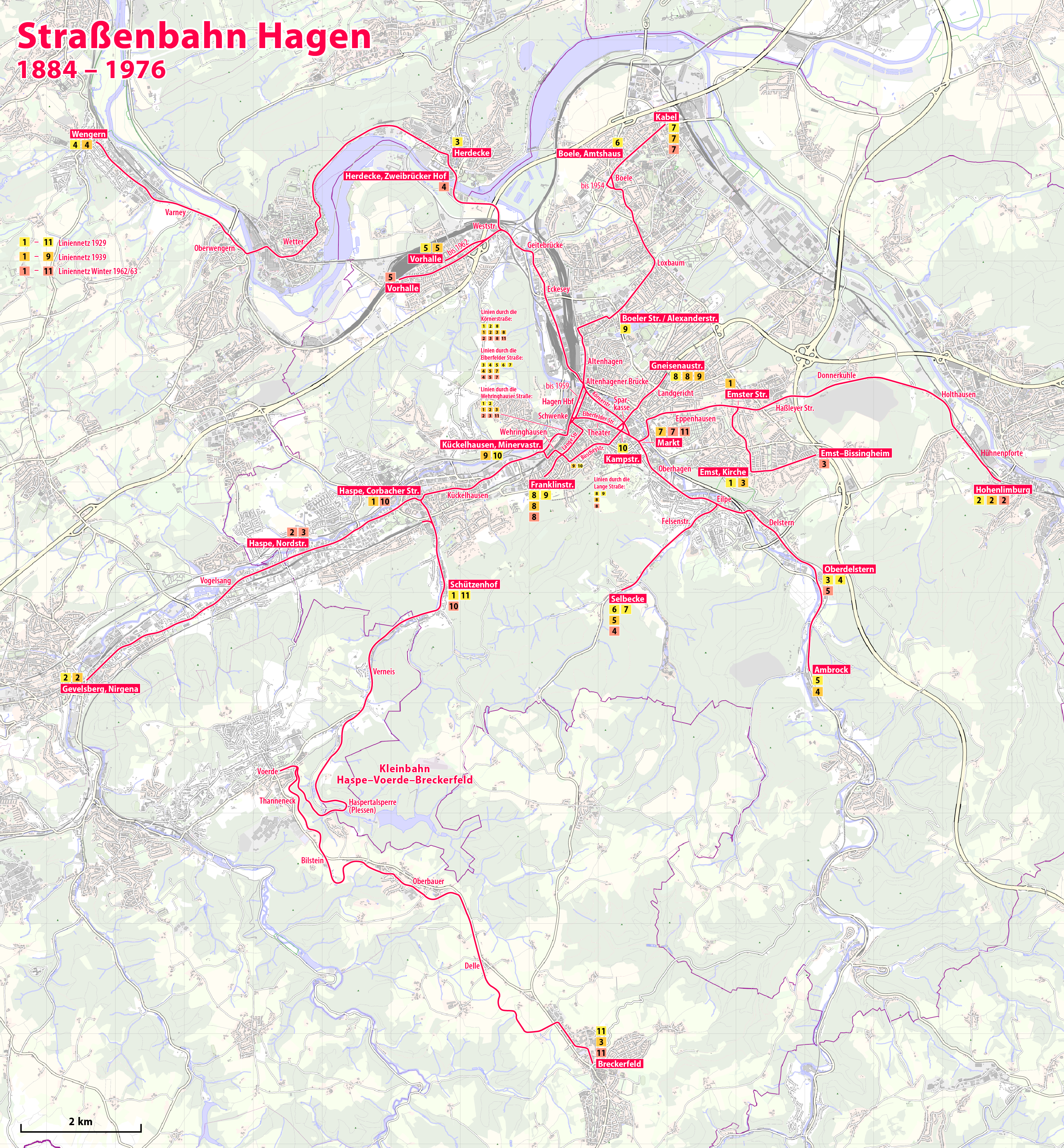 Karte der Straßenbahn Hagen (1884.1976)